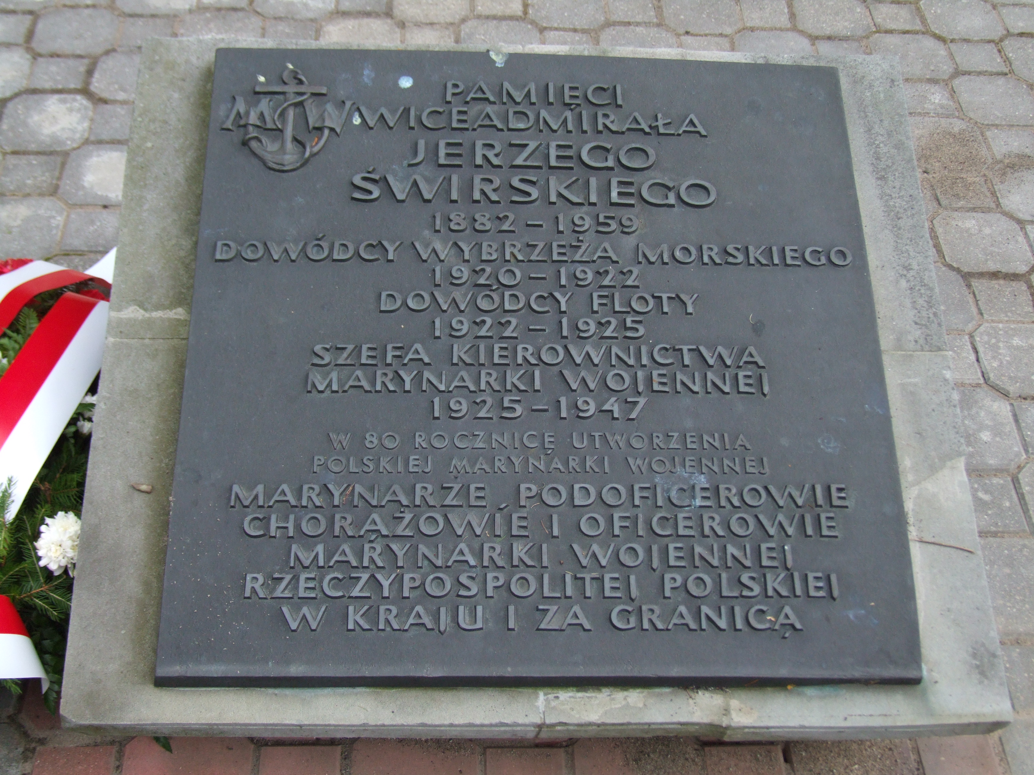 Gdynia-Oksywie Cmentarz Marynarki Wojennej